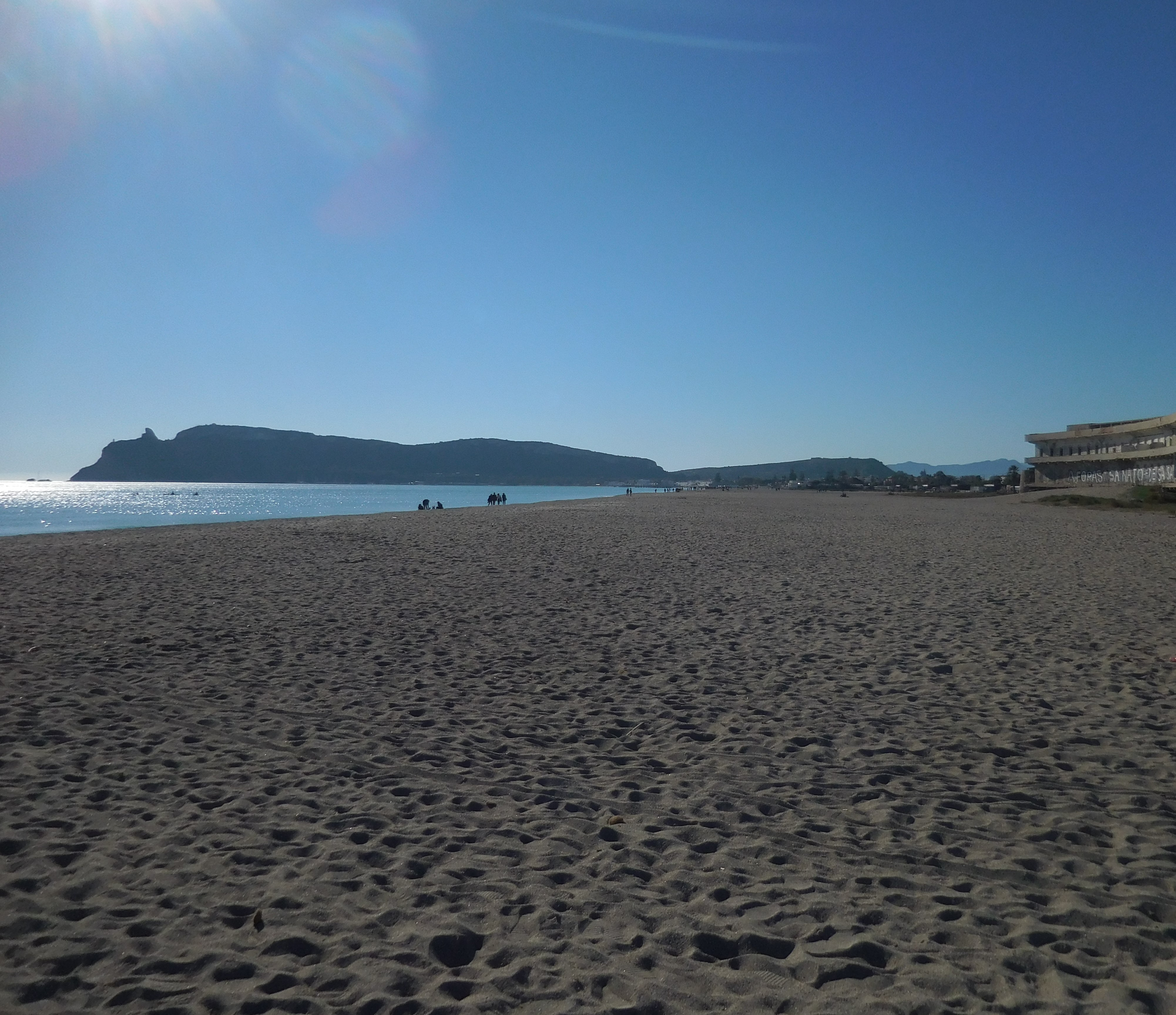 Plaža Poetto v Cagliariju